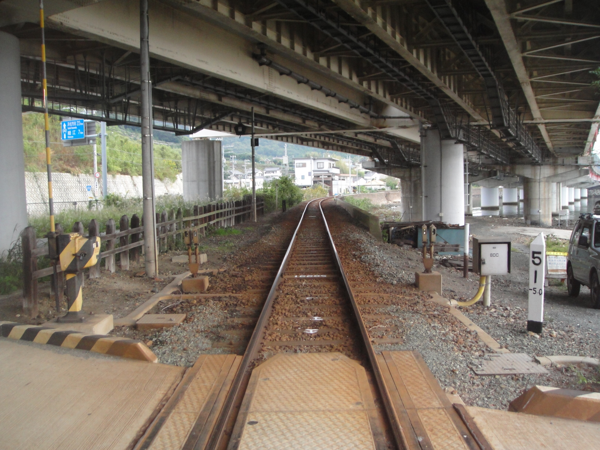 天竜浜名湖線を浜名湖佐久米駅-東都筑駅間の踏切より、浜名湖佐久米駅方面に向かって撮影。また、東名高速との交差地点。